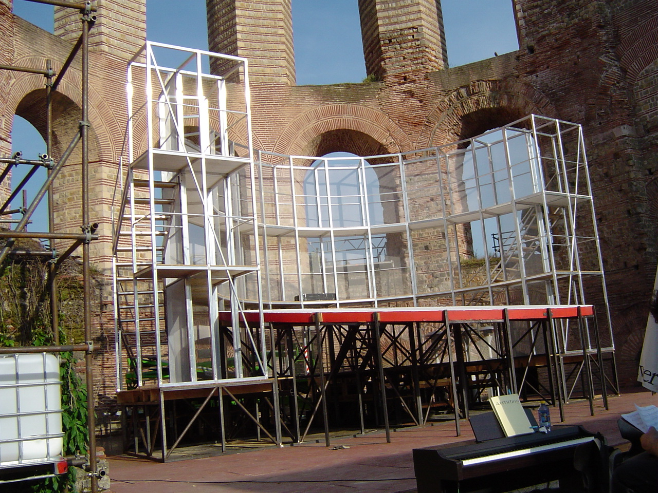 Ant01